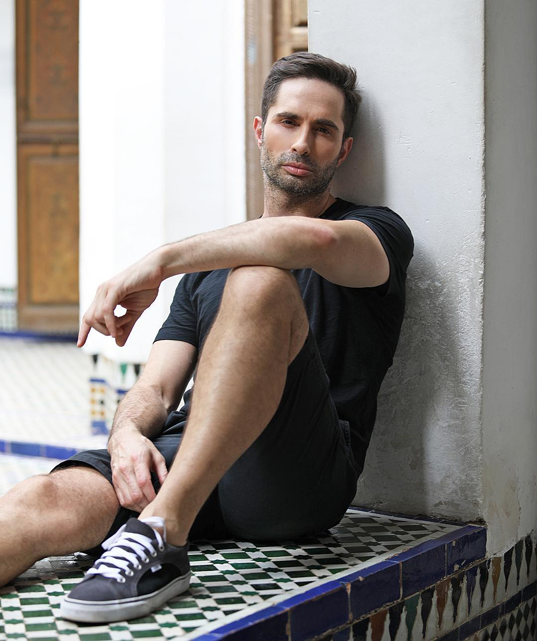 Foto de portada